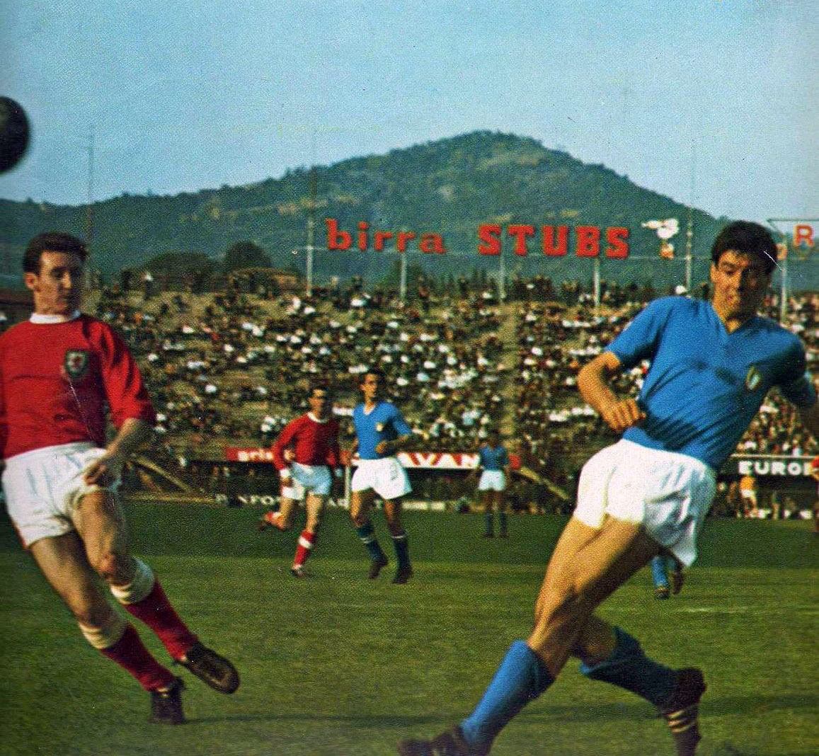 Firenze, stadio Comunale, 1º maggio 1965. Il difensore e capitano azzurro Sandro Salvadore (a destra) in azione nell'amichevole Italia – Galles (4-1).